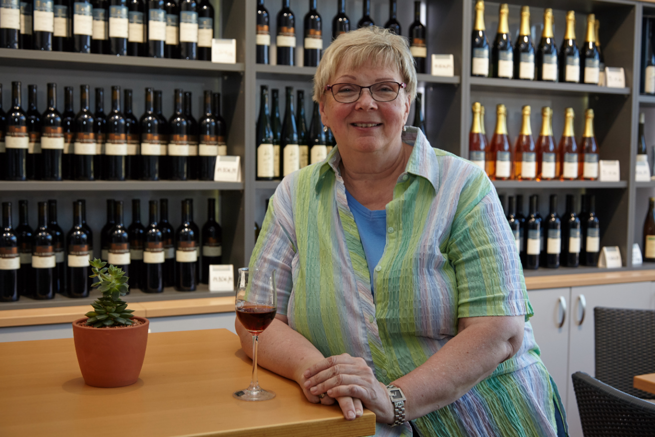 Prof. Dr. Monika Christmann, Hochschule Geisenheim University, Präsidentin der OIV